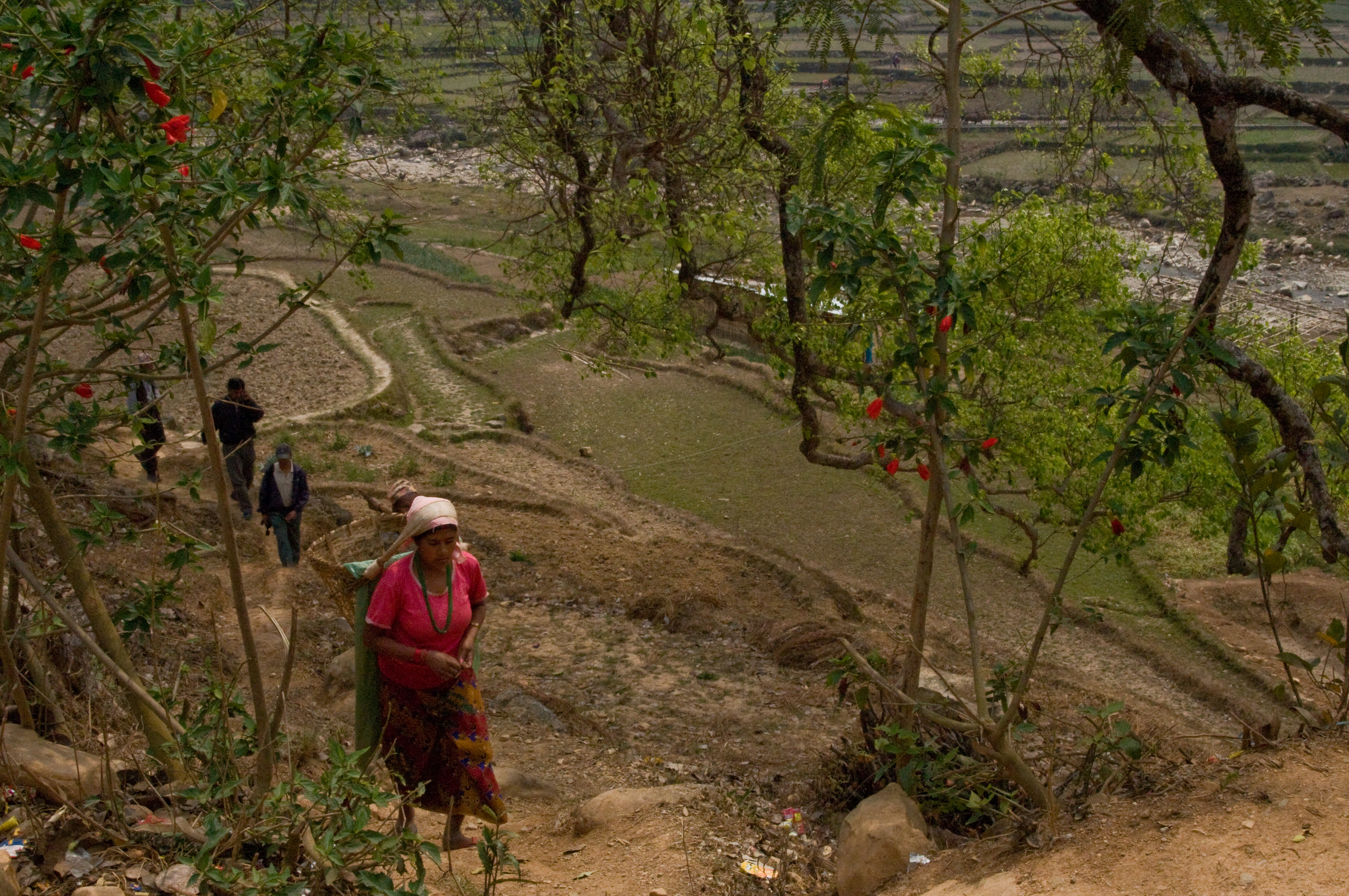 Syangja district - Nepal